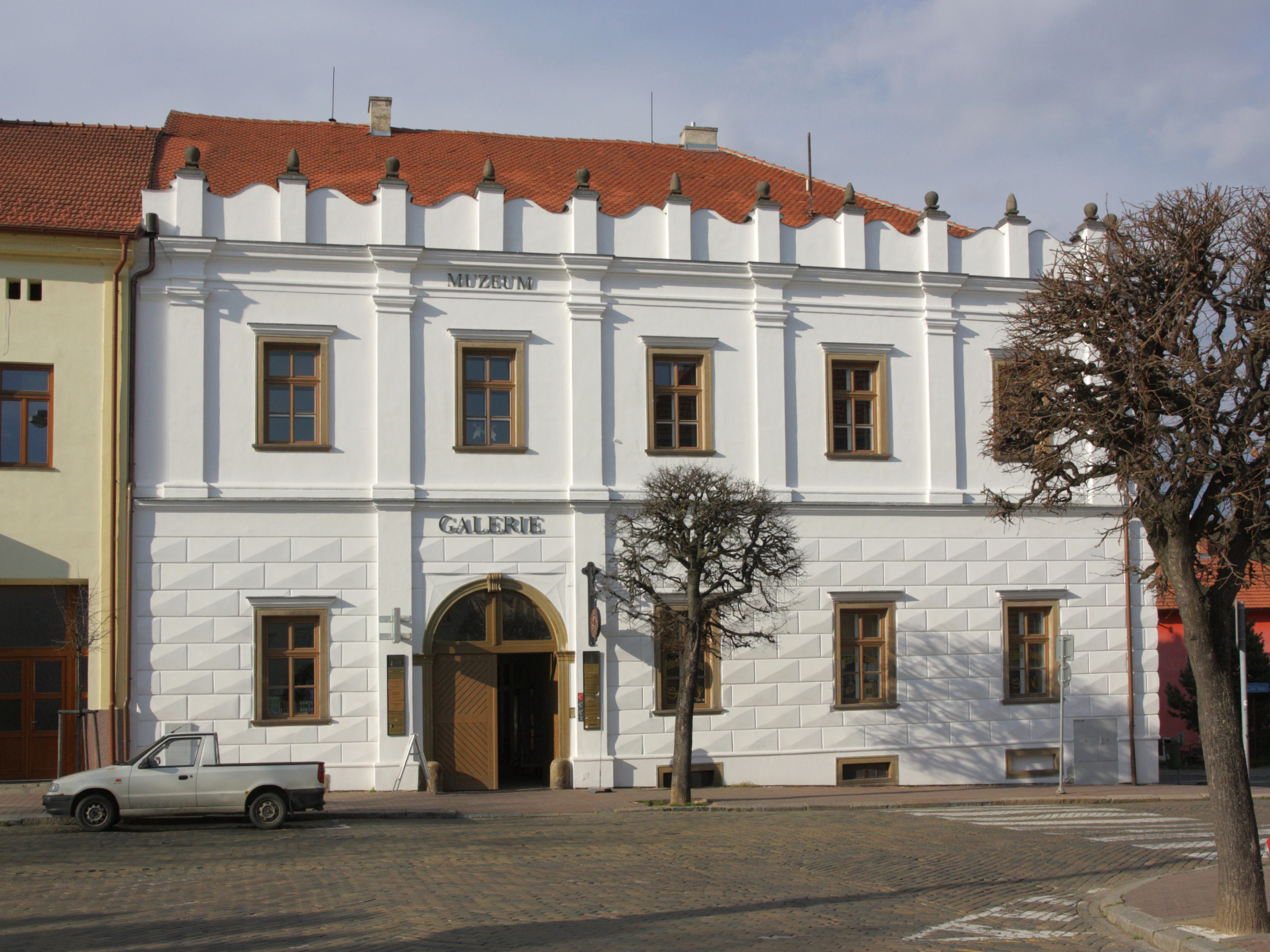 Moravský Krumlov - Knížecí dům čp. 40.